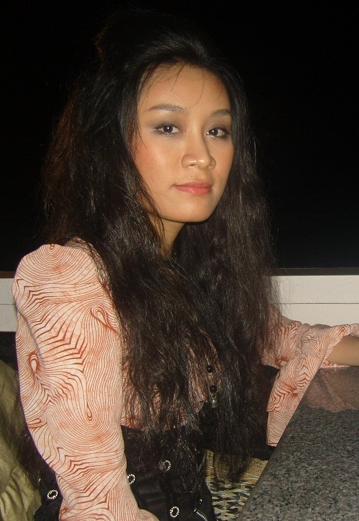 Ảnh chụp ca sĩ Minh Thư sau một buổi diễn